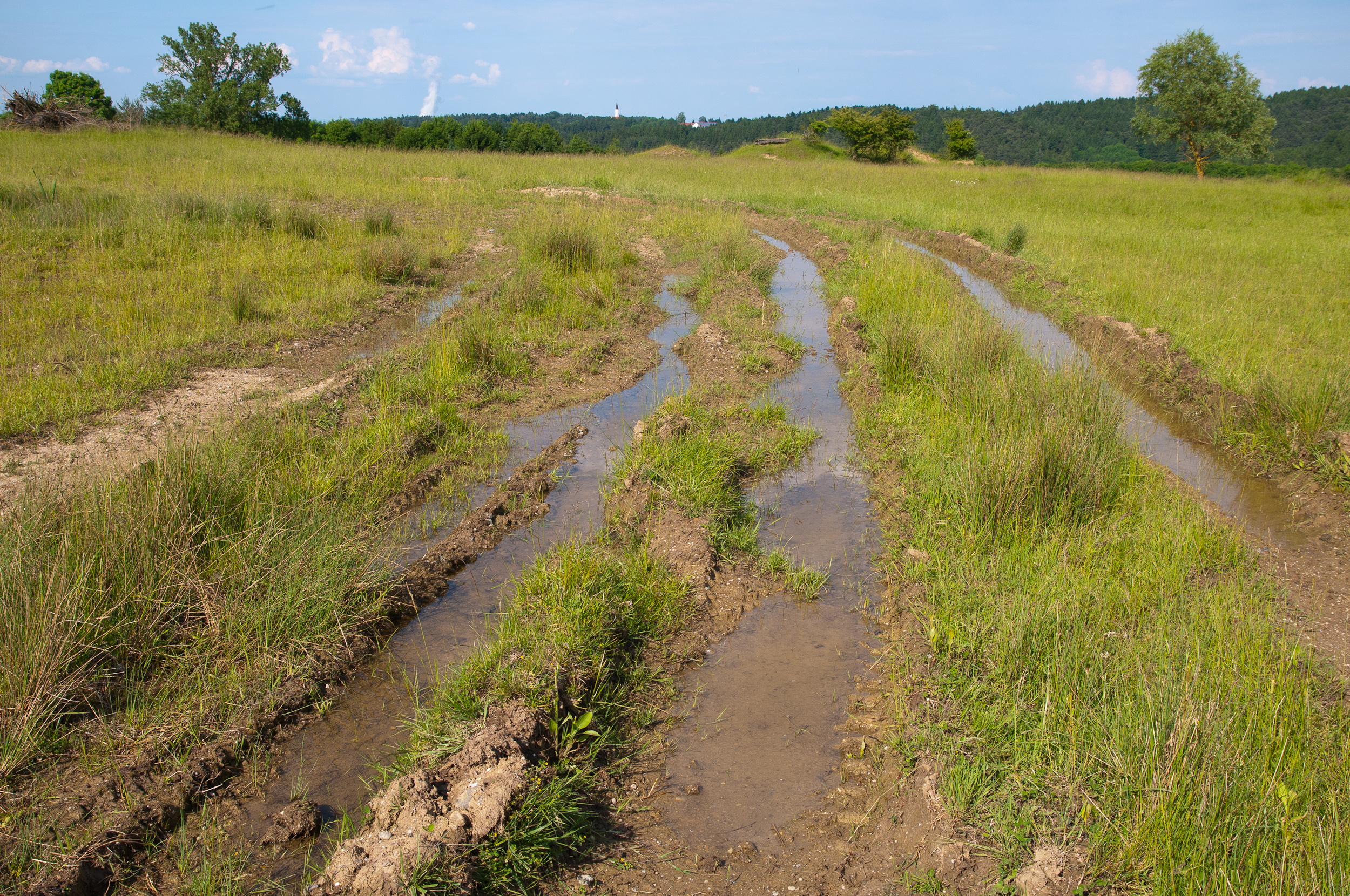 Im Naturschutzgebiet "Ehemaliger Standortübungsplatz Landshut mit Isarleite" werden durch schwere Radlader die ehemaligen Panzerspuren nachgezogen. Dadurch entstehen Pfützen und Wasserlöcher die das vielfältige Artenspektrum im Naturschutzgebiet erhalten sollen.